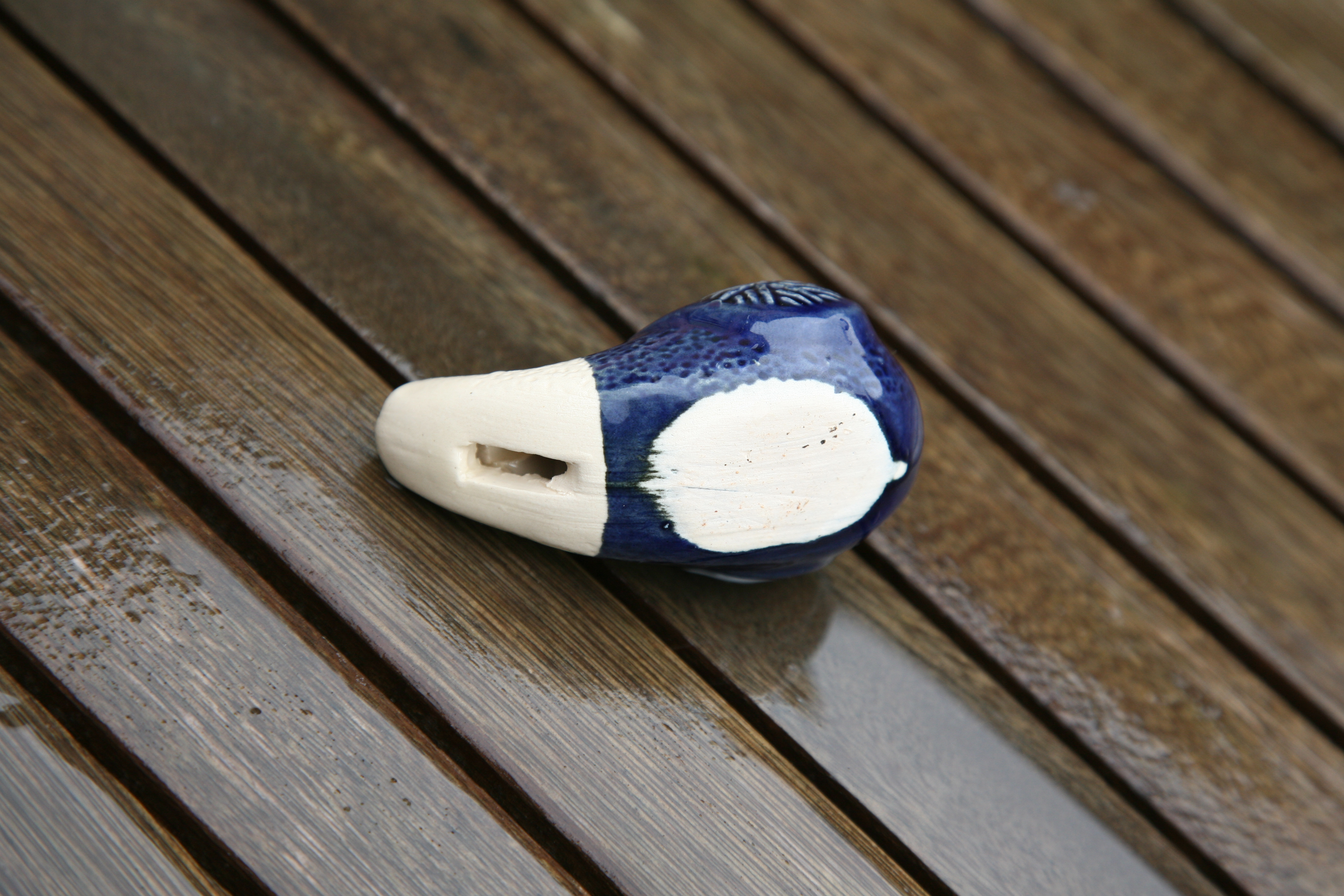 Savipiilu ehk pardipill ehk savipill, Leedu keraamikute taies, eesti rahvapill. Kõhualune.